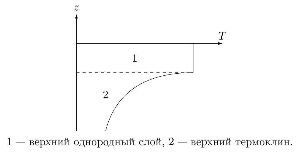 Эту картинку я создал сам во время работы над курсовой работой, рисовал сам